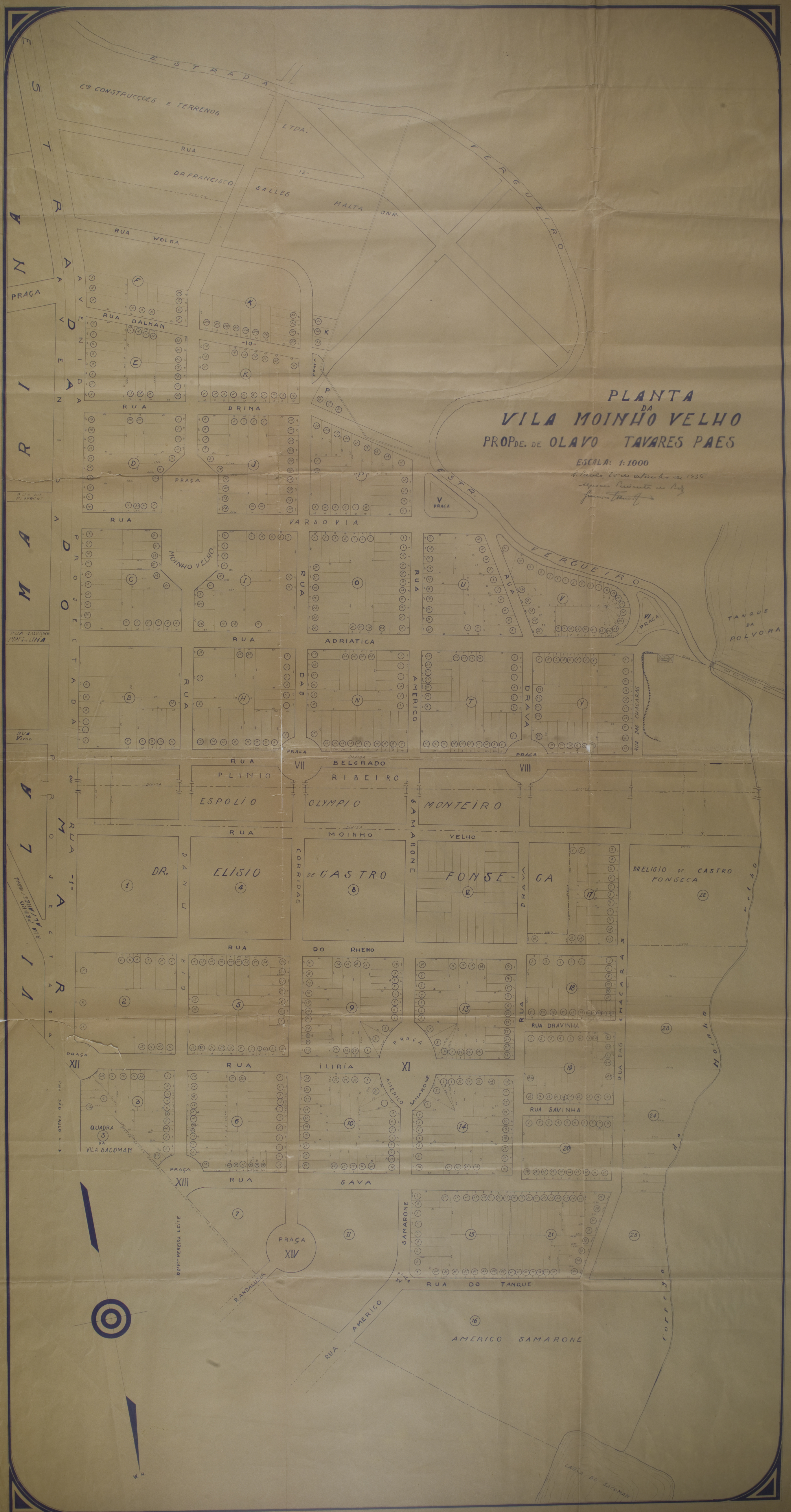 Obra que integra o acervo do Museu Paulista da USP. Coleção João Baptista de Campos Aguirra